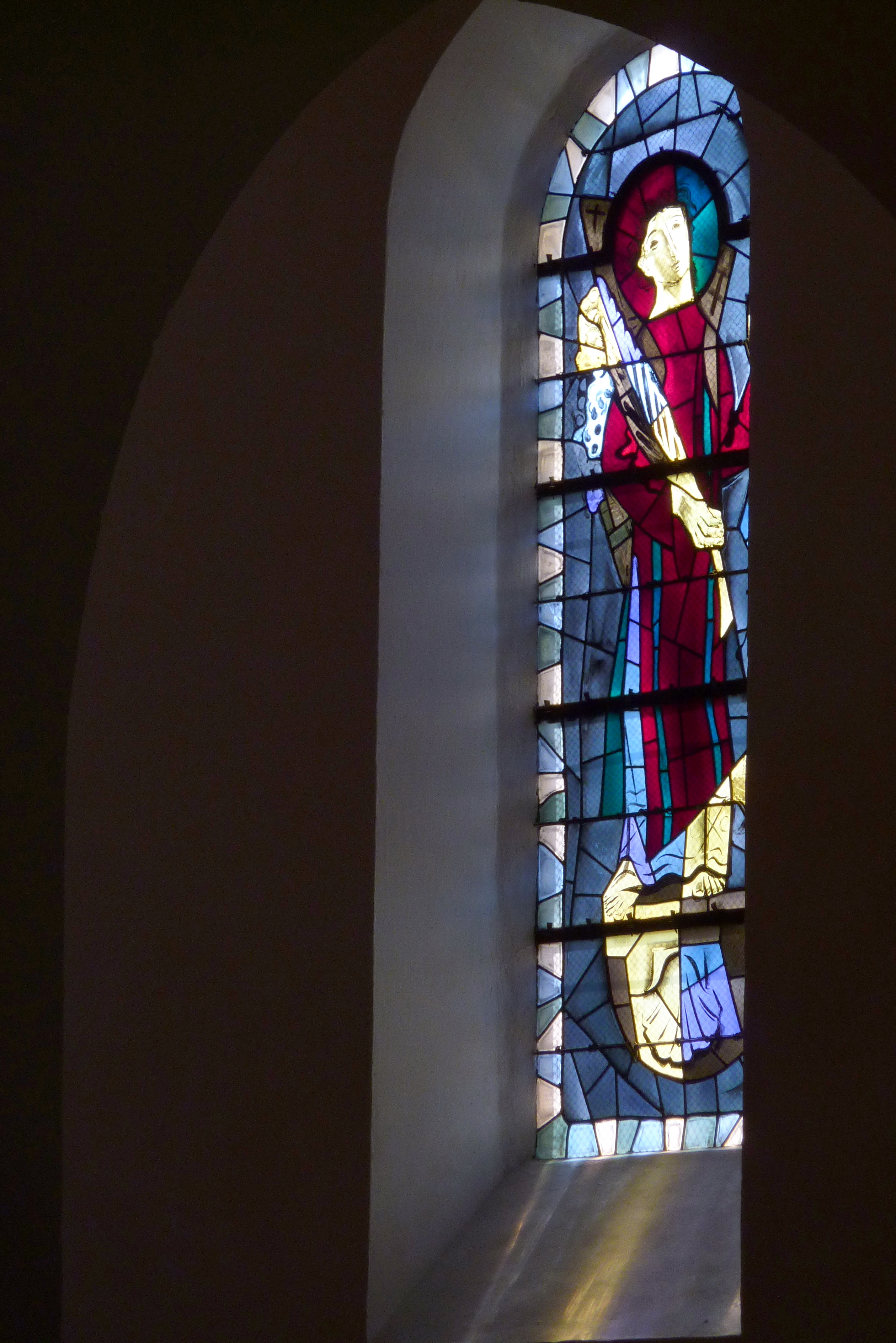 Bleiglasfenster in der katholischn Pfarrkirche Saint-Amand in Thomery im Département Seine-et-Marne (Île-de-France), Darstellung: hl. ?